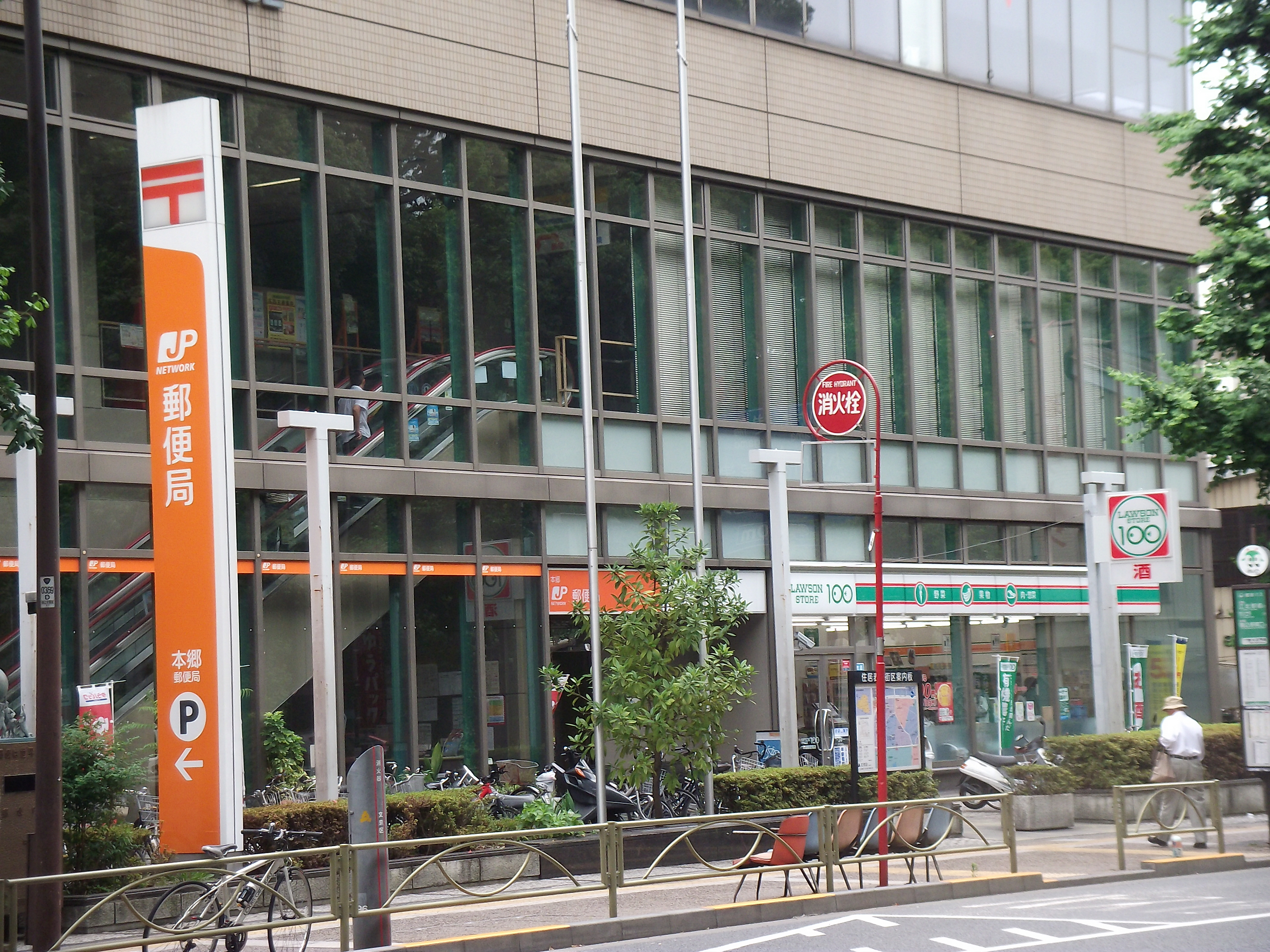 本郷郵便局に併設されているローソンストア100。